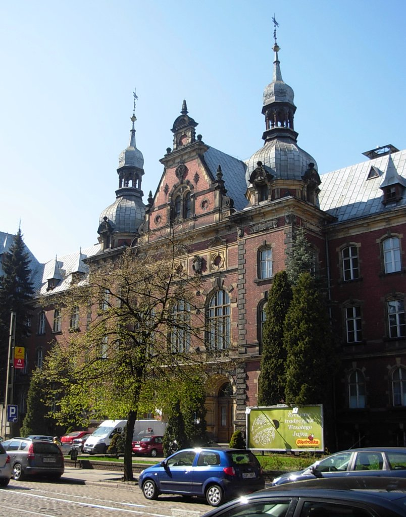 Budynek byłej Dyrekcji Kolei Wschodniej w Bydgoszczy